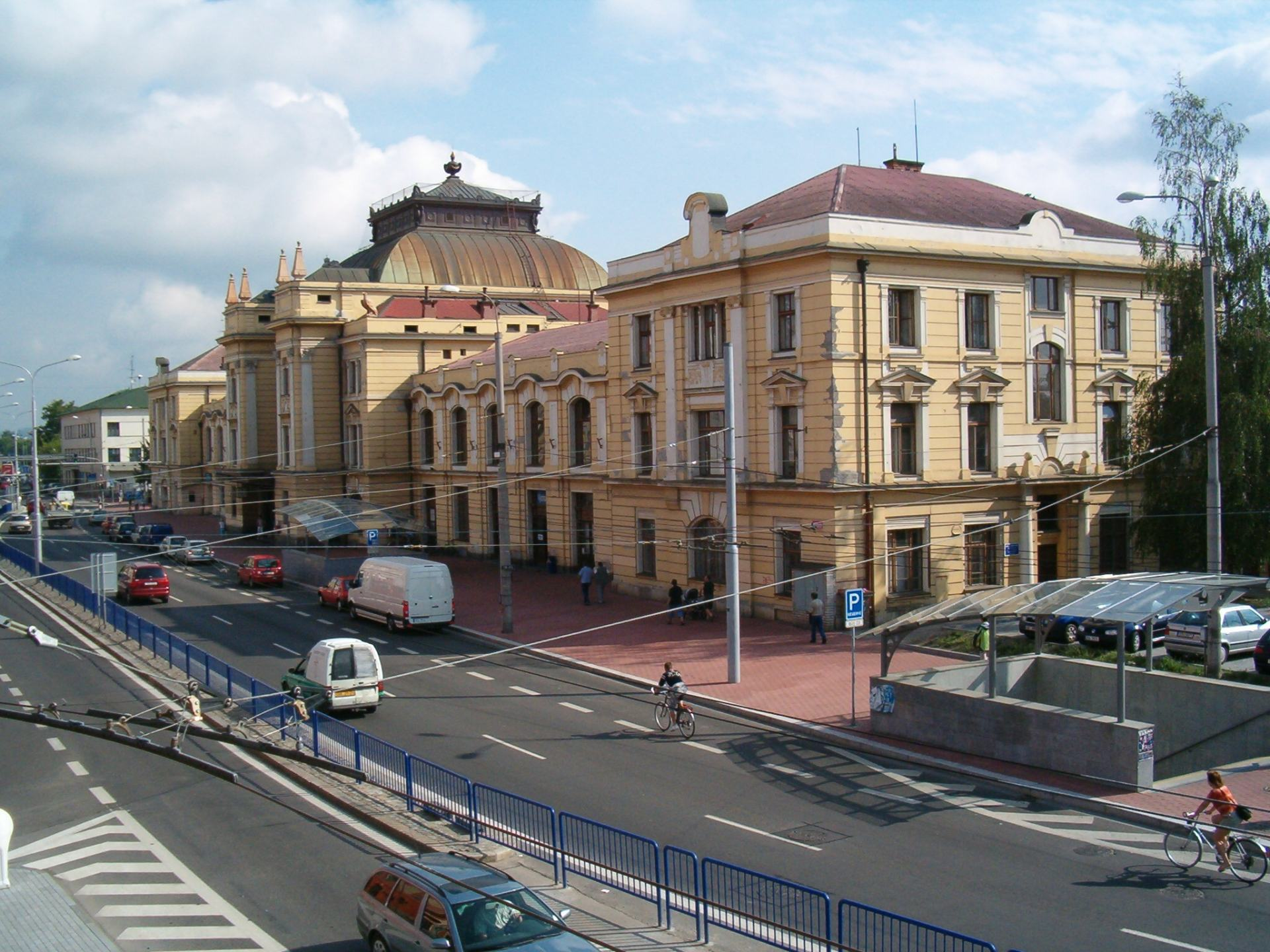 České Budějovice - železniční stanice